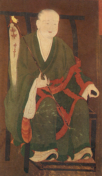 고려 후기에 활동한 고승 16명을 그린 순천송광사십육조사진영 (順天 松廣寺 十六祖師眞影) 중 제2세 진각국사(眞覺國師) 혜심(慧諶)